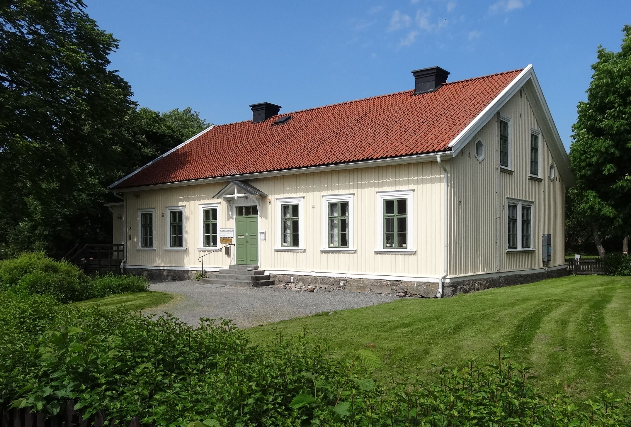 Älvsborgs Kungsladugårds mangårdsbyggnad i Klippans kulturreservat, sedd från väster.